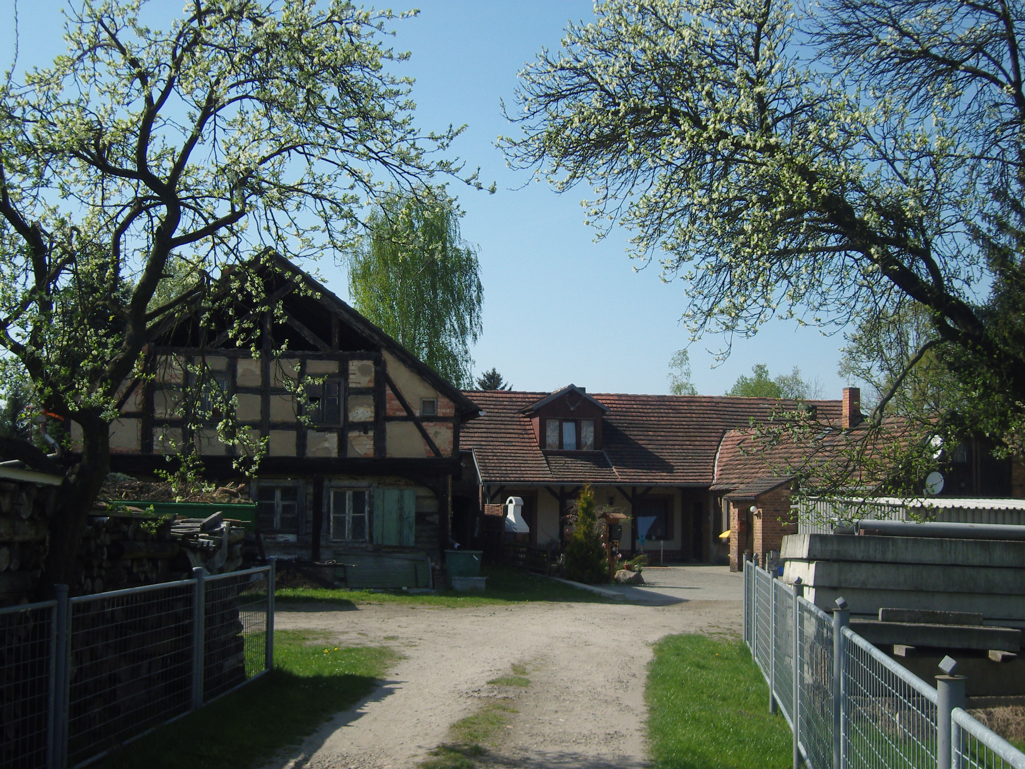 Wohnhaus im Senftenberger Ortsteil Sedlitz in der Senftenberger Straße 12; Baudenkmal